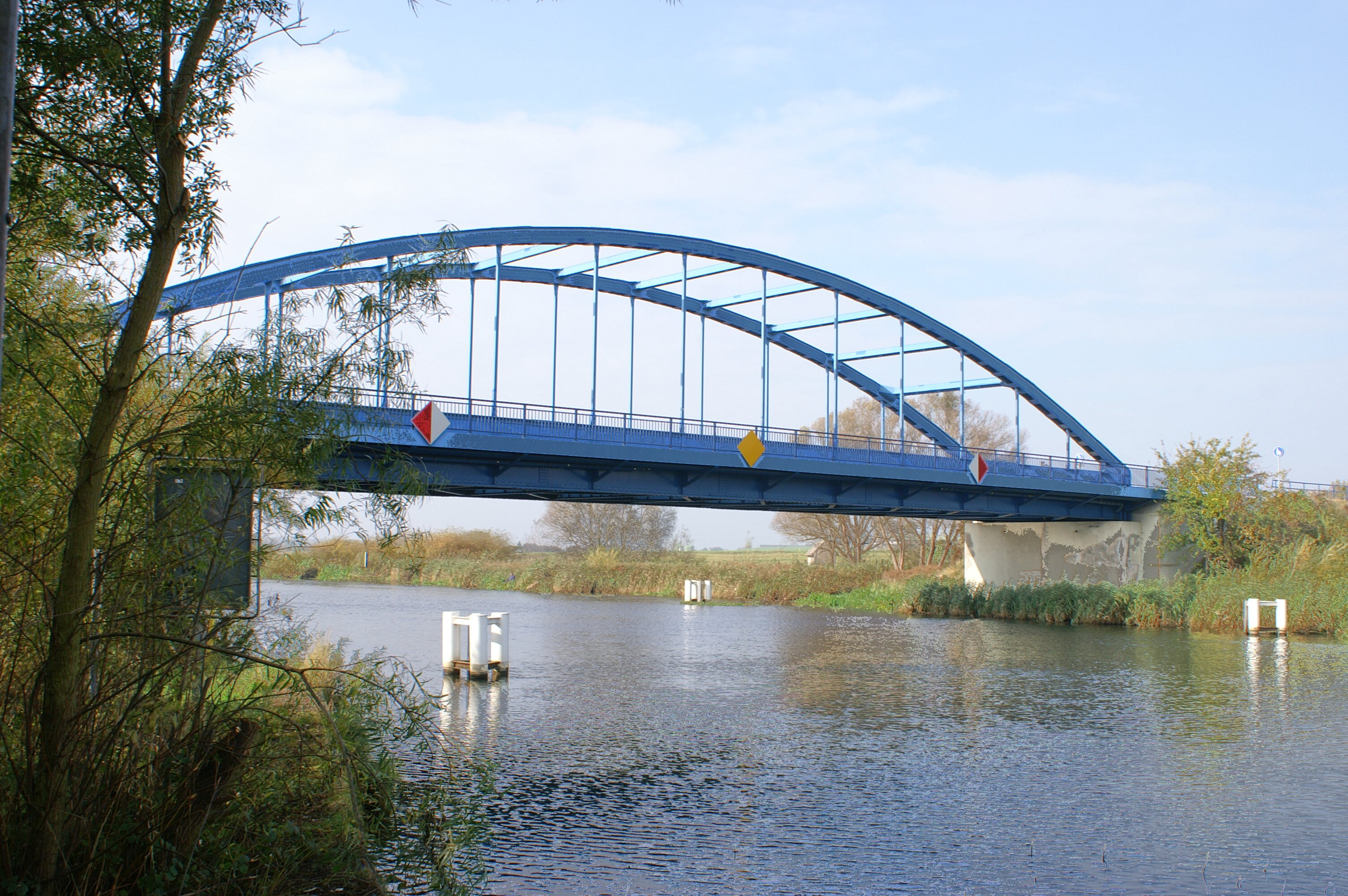 Demmin - Meyenkrebsbrücke - Ostseite